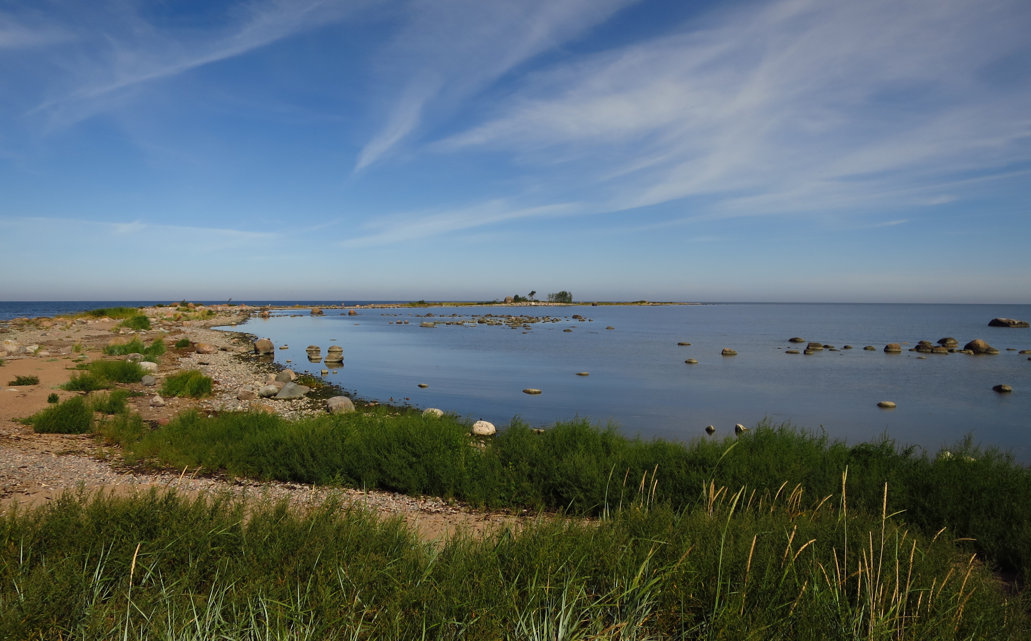 Purekkari neem Lahemaa rahvuspargis